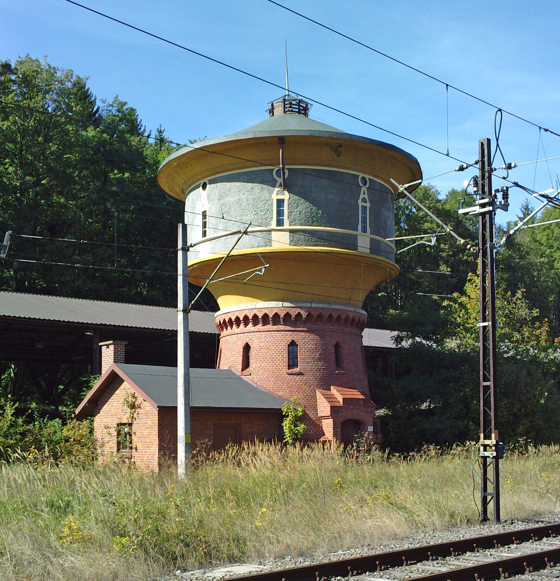 Międzylesie - wodociągowa wieża ciśnień (kolejowa), 1908 12.1996.